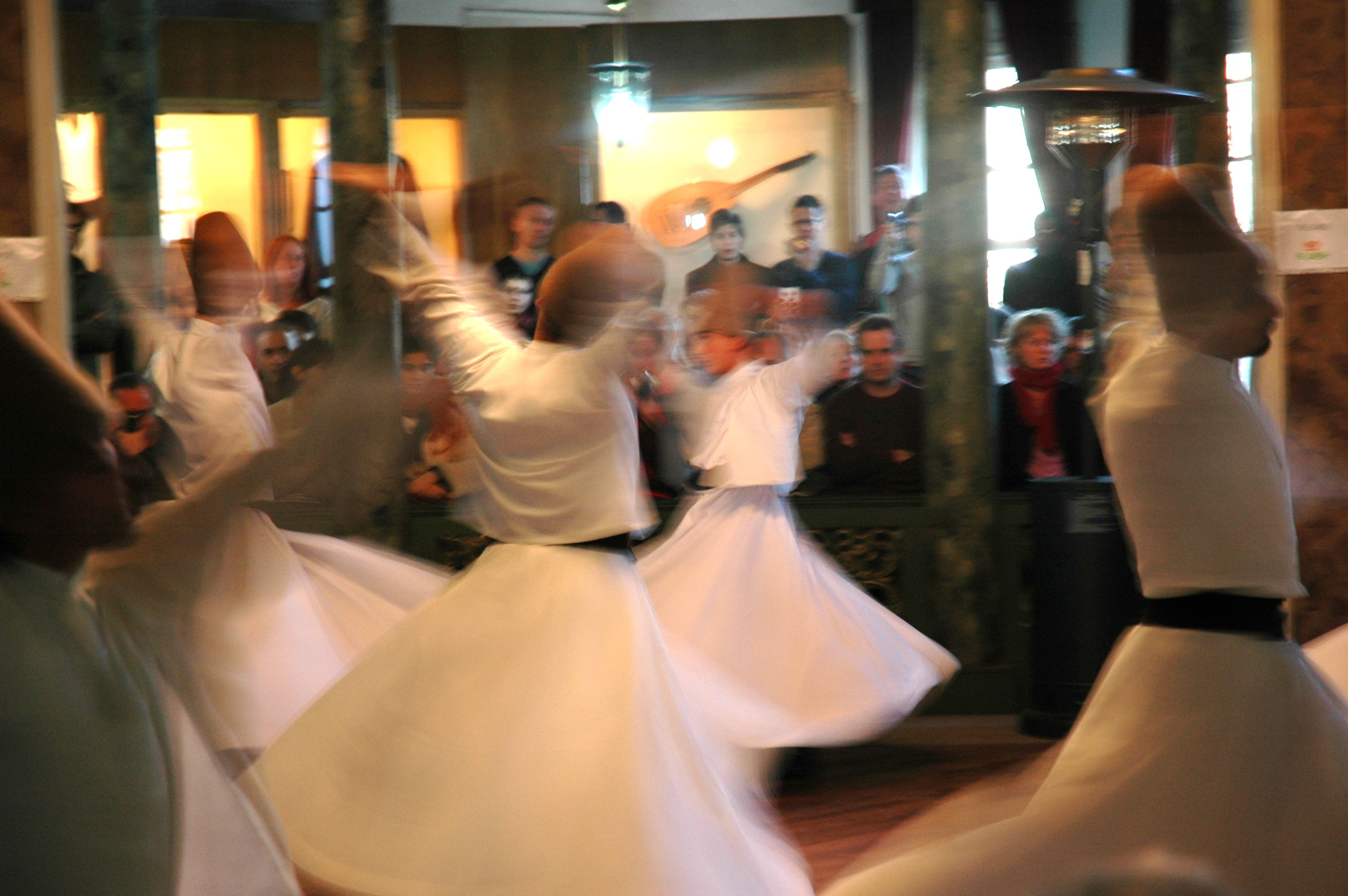 Istanbul - Monestir Mevlevi - Dervixos dansaires